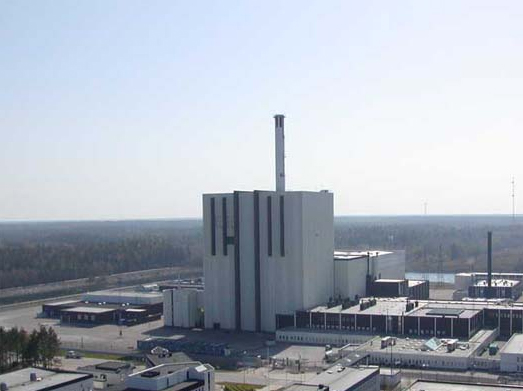 Forsmark1